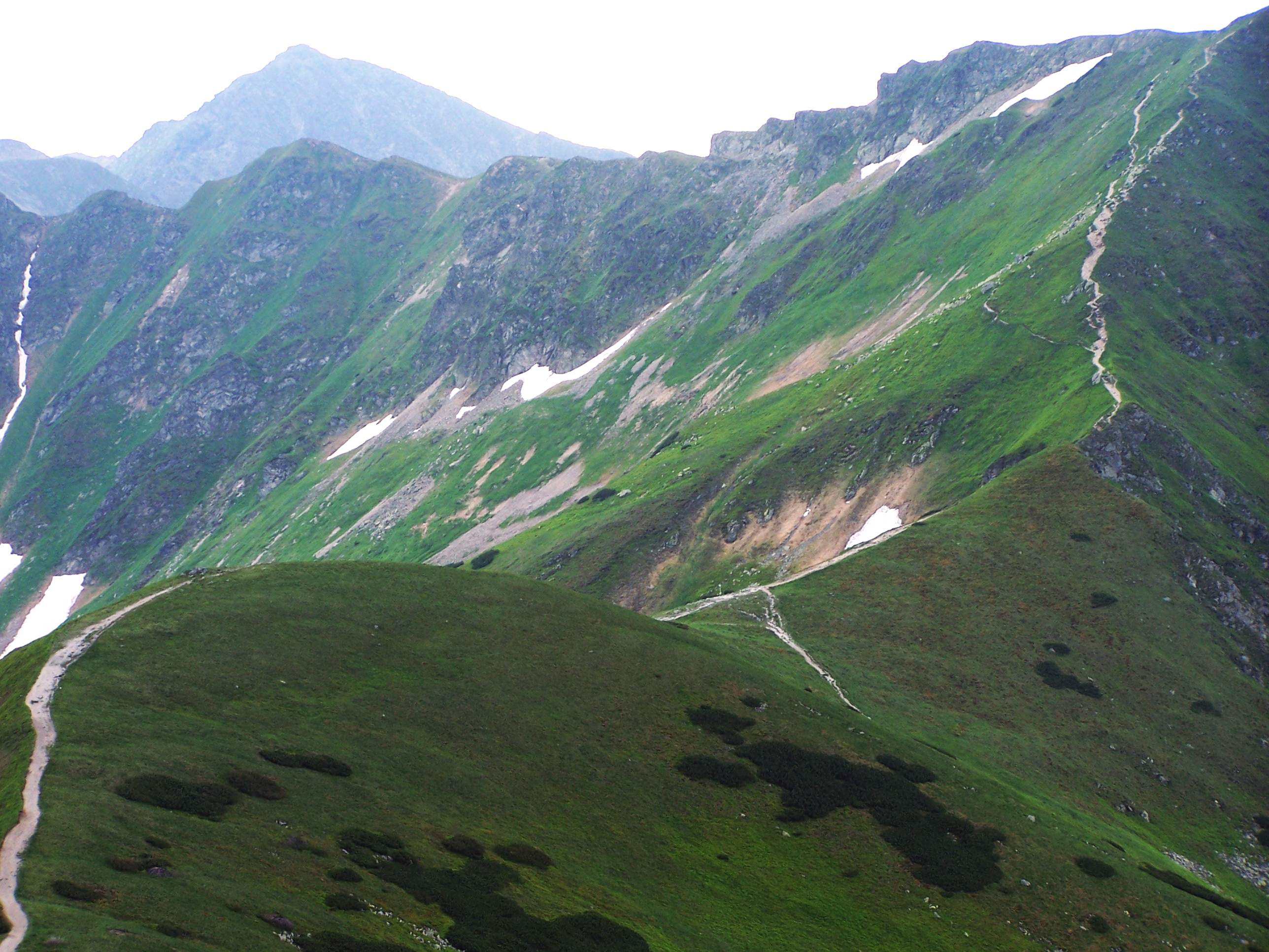 Siwa Przełęcz (West Tatra Mountains)